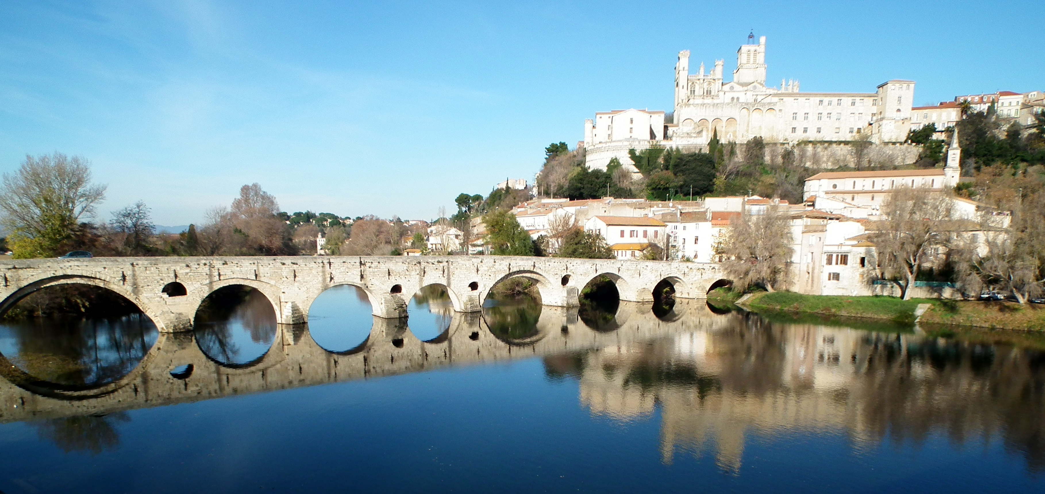 кафедрал